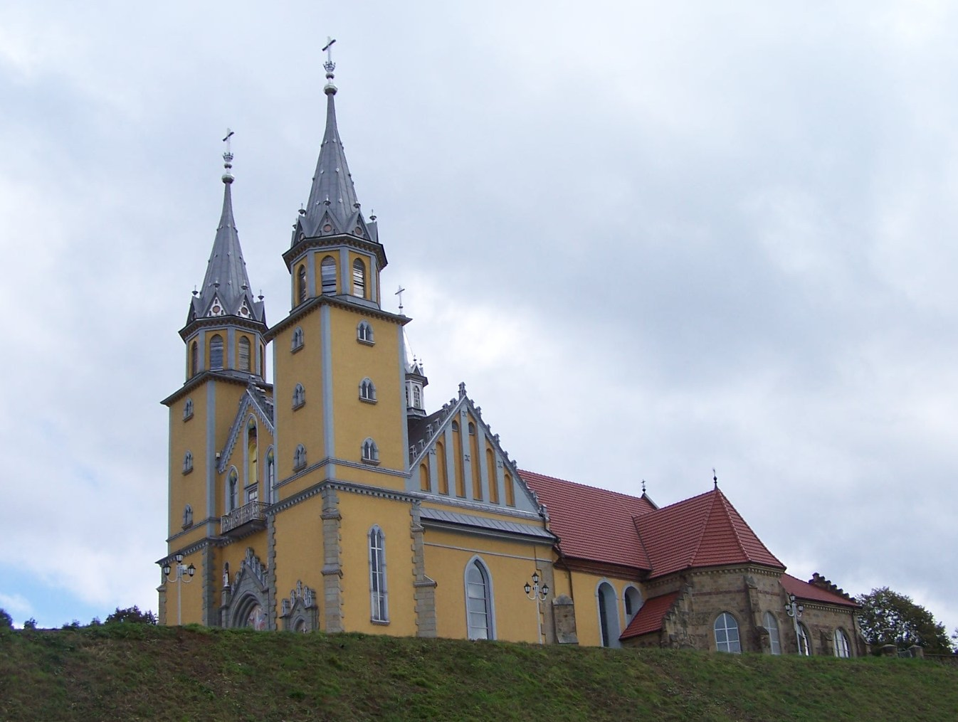 Trzciana (województwo małopolskie)- kościół